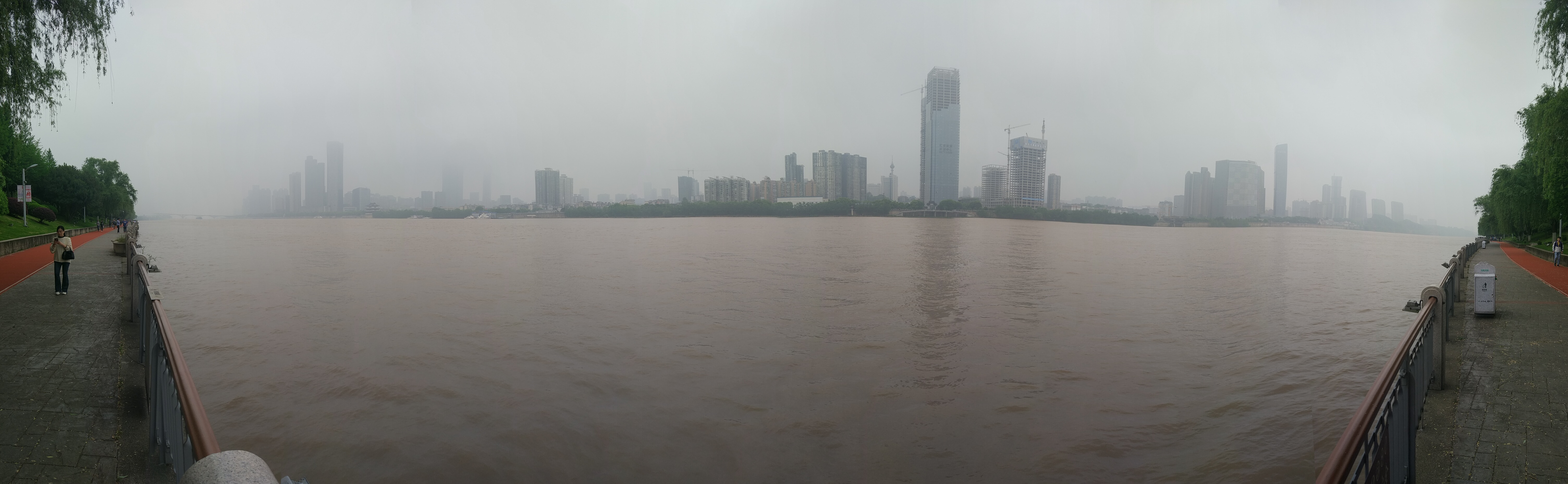 橘子洲头西全景照